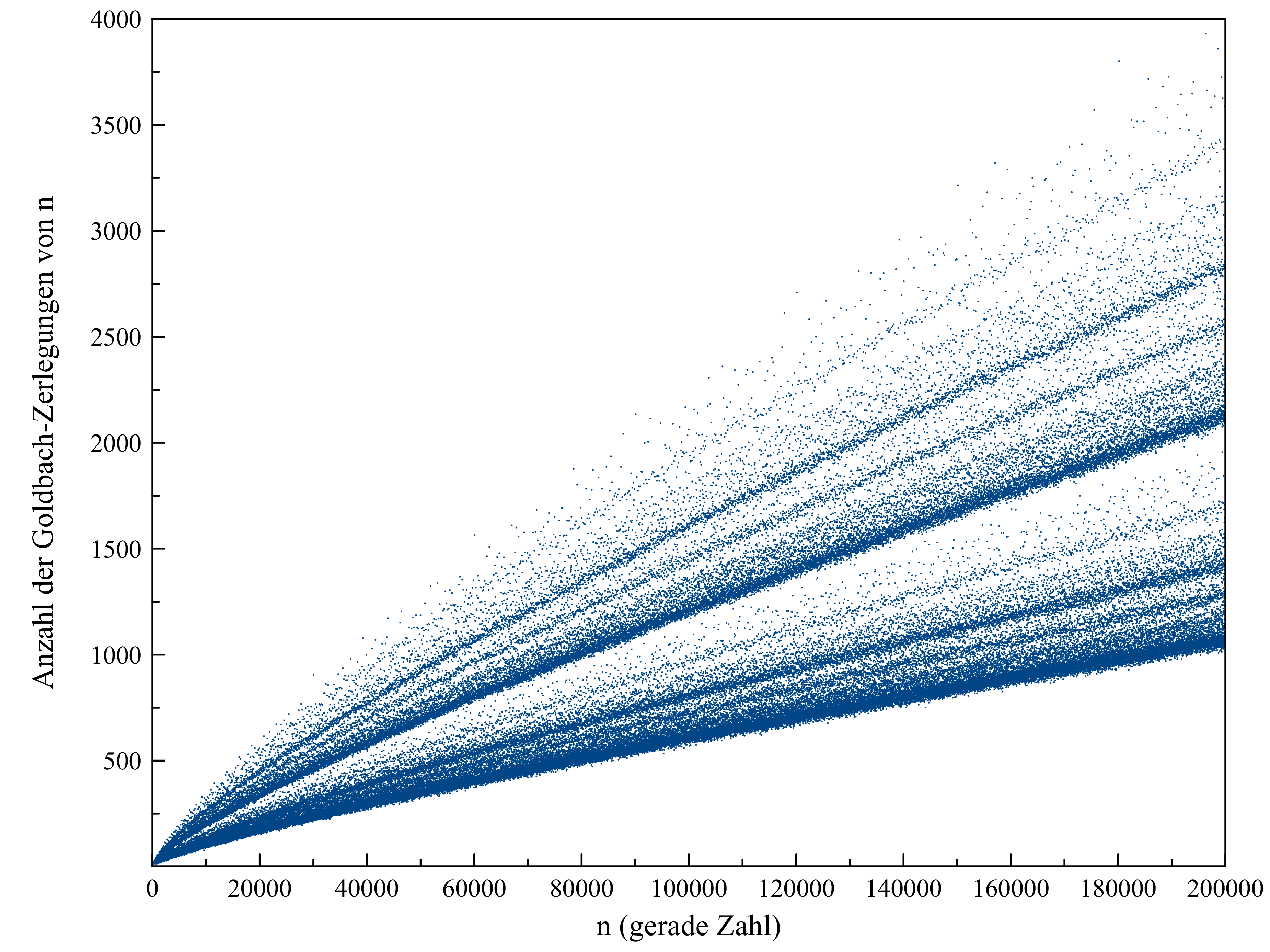 Die Anzahl der Goldbach-Zerlegungen für alle geraden Zahlen zwischen 4 und 200000.